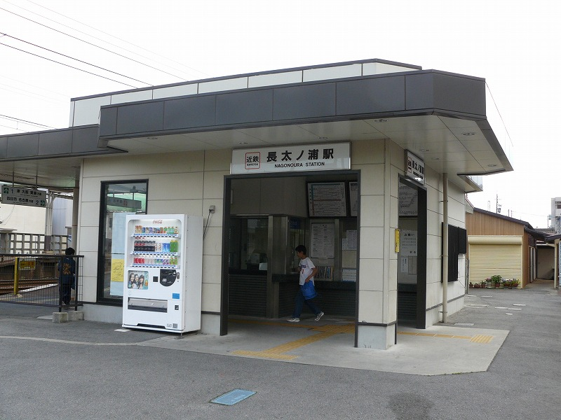 近鉄ja:名古屋線ja:長太ノ浦駅 2007年05月19日 投稿者により撮影